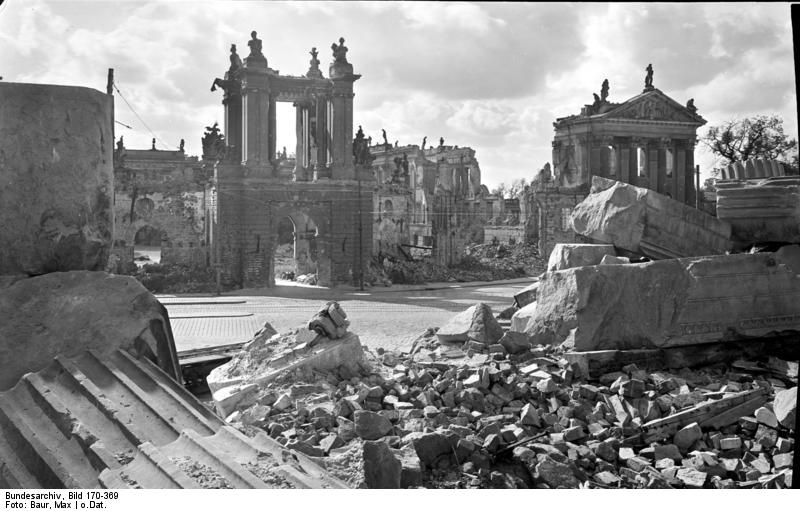 Potsdam.- Ruinen